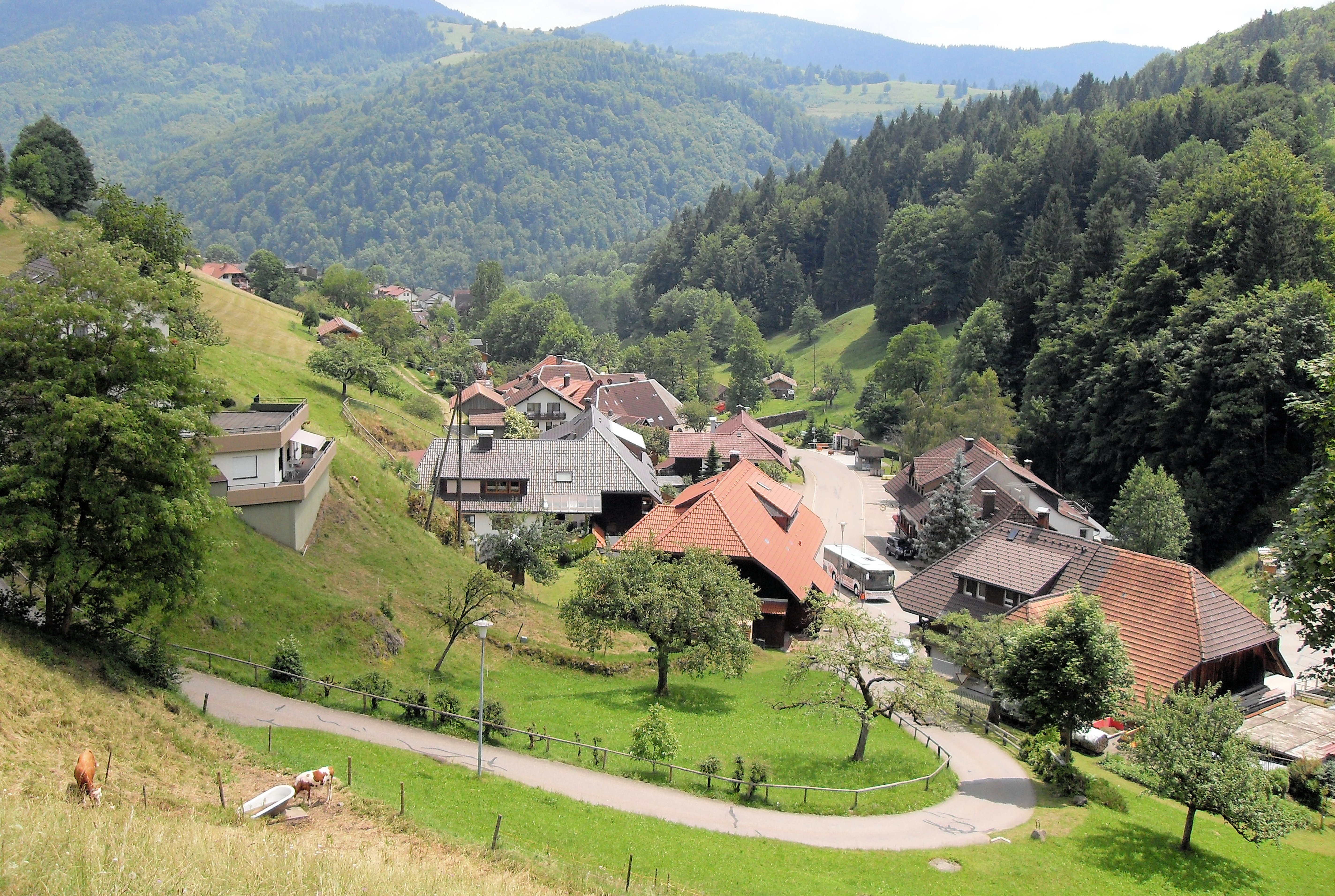 Blick aus Nordwesten auf Aitern, Schwarzwald, Deutschland